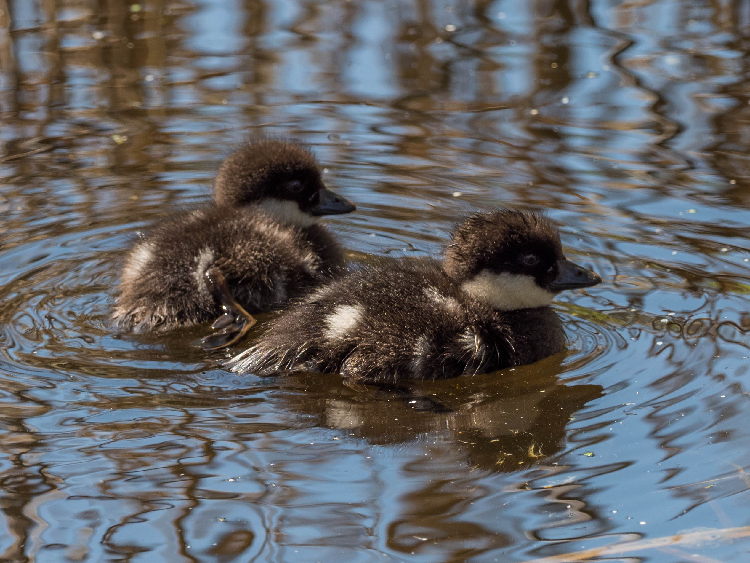 Busephala clangula